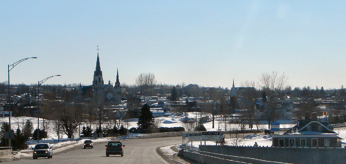 Hawkesbury, Ontario, Canada